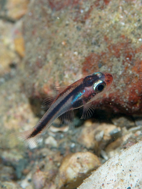 ヤミテンジクダイ Apogon semiornatus